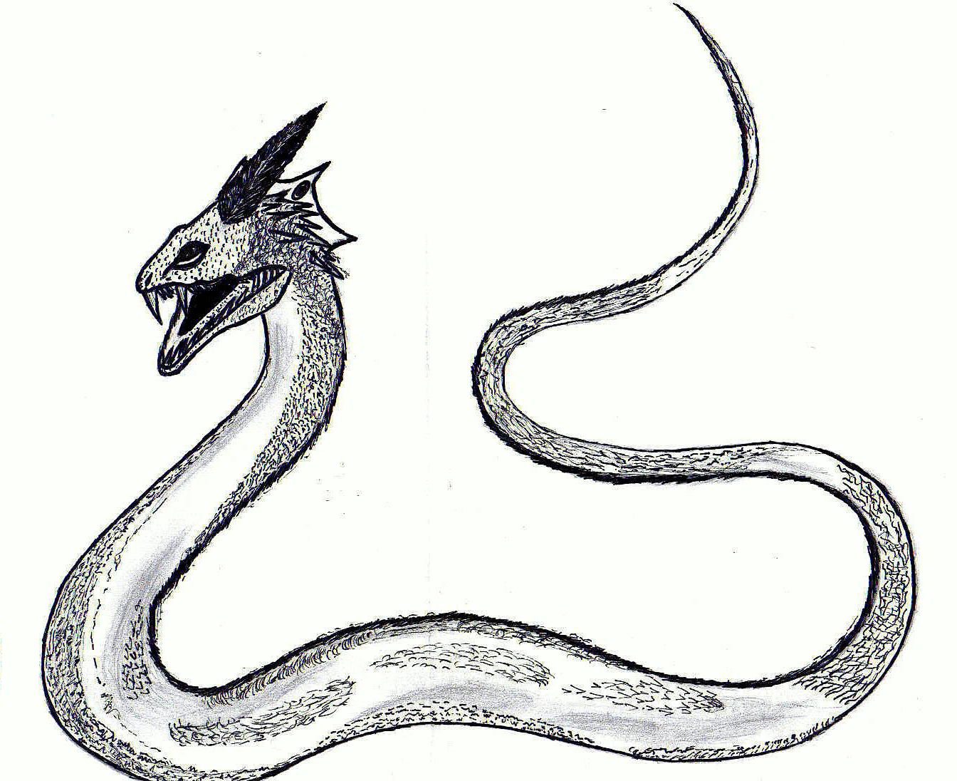 Basilisco, desenho de Rodrigo Ferrarezi